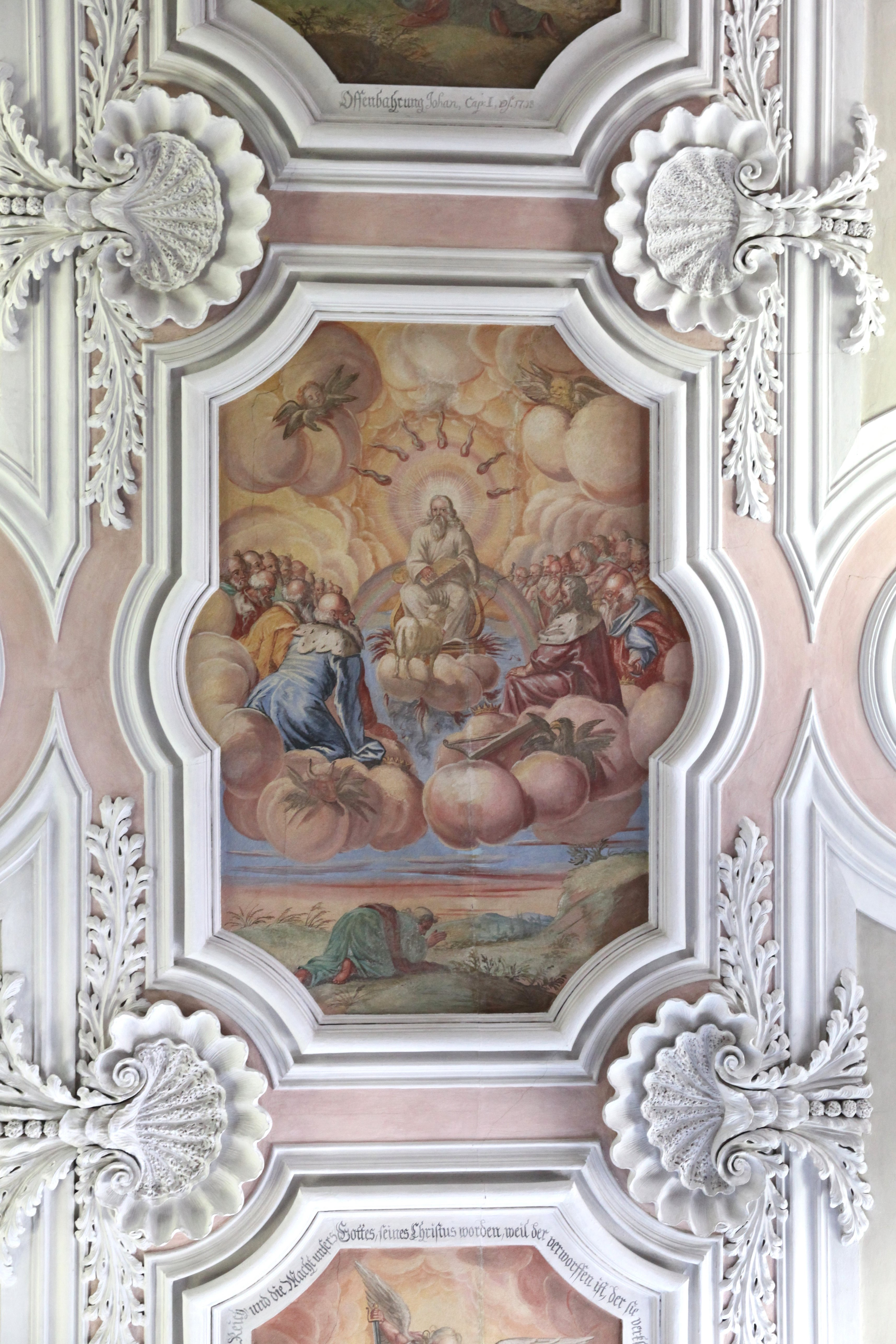 Deckenbild, Evangelische Pfarrkirche Großgarnstadt